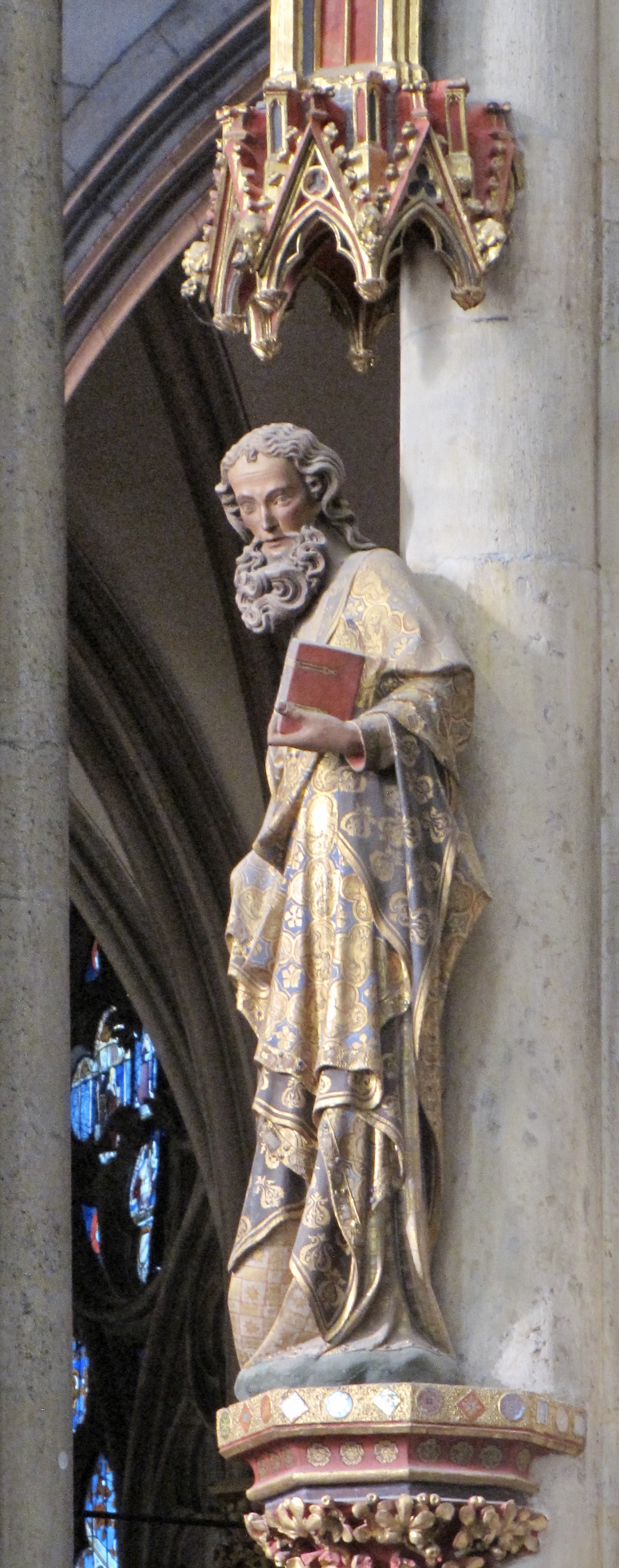 Kölner Dom: Apostel Jakobus Minor. Eine der 14 Chorpfeilerfiguren, geschaffen zwischen 1320 und 1340 von der Kölner Dombauhütte unter Leitung von Dombaumeister Johannes. Tuffstein, bunt bemalt. Höhe der Figur: 2,15 Meter. Zählt zu den Hauptwerken Europäischer Bildhauerkunst im beginnenden 14. Jhd.